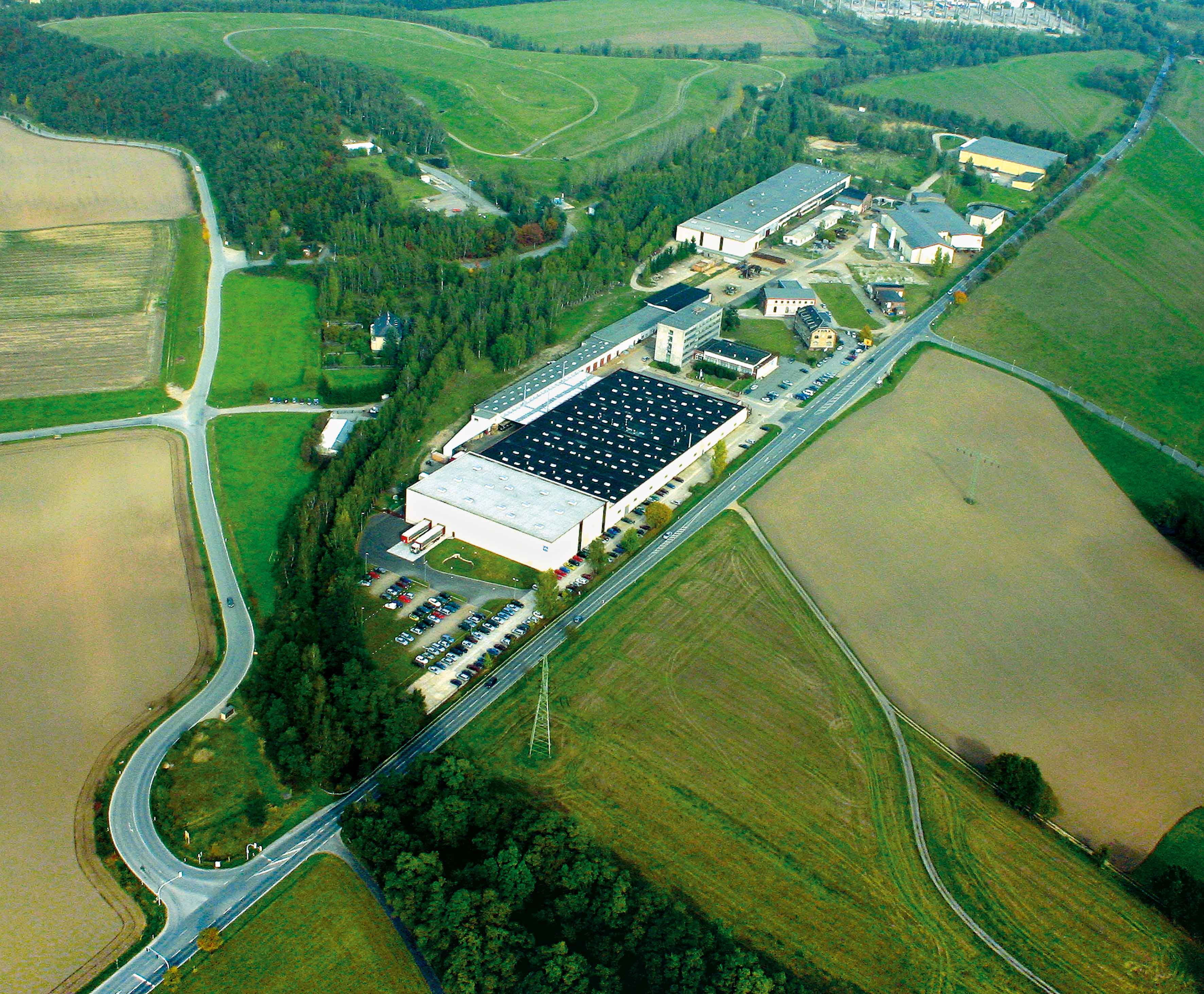 VEM motors Thurm GmbH, Luftbild. Ehemals VEB elmo Thurm, zuvor VEB Steinkohlenwerk Martin Hoop, Schacht III. Zwickau-Pöhlau, Sachsen, Deutschland.